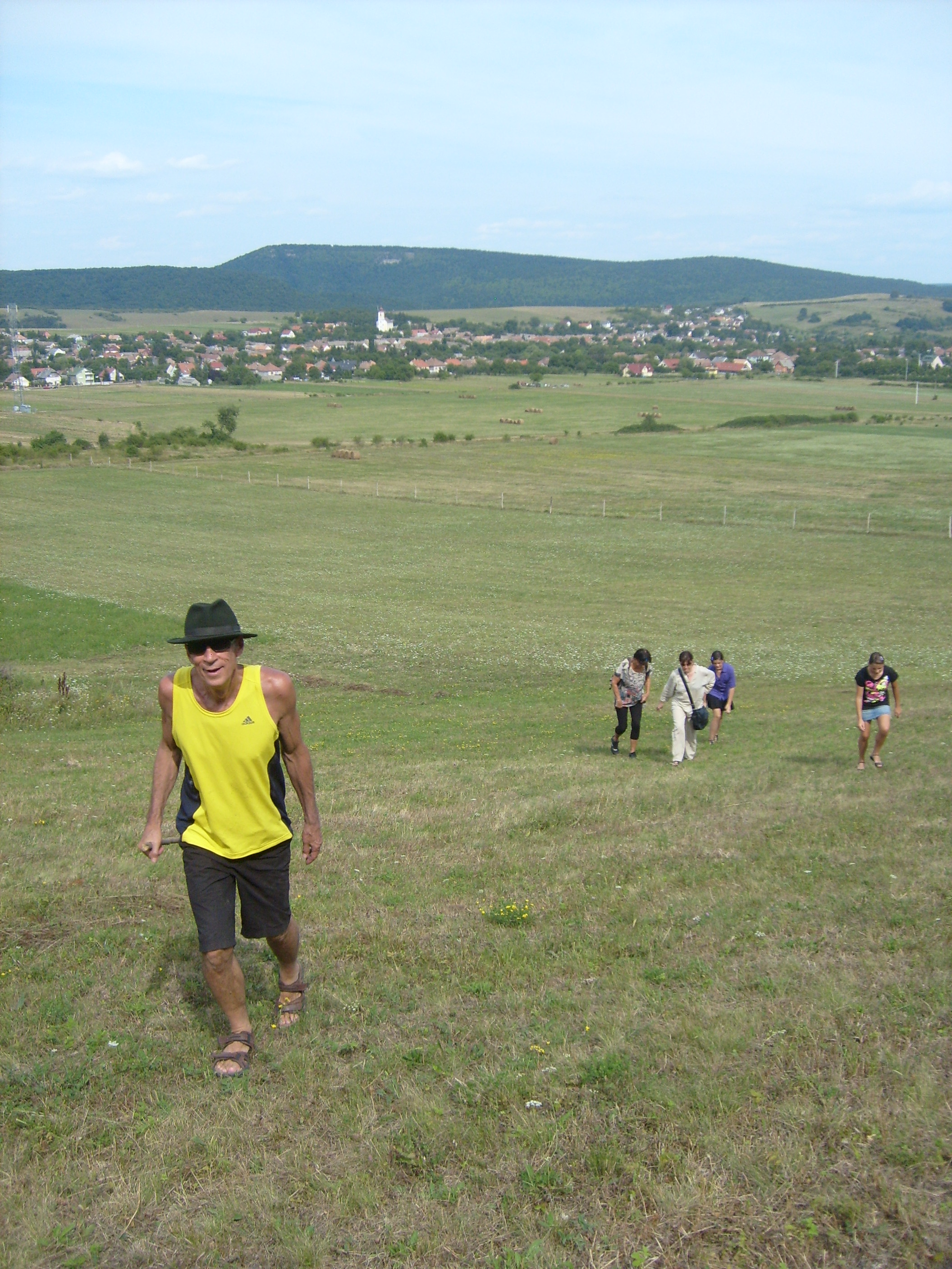 John A. Hiigli Szokolyán